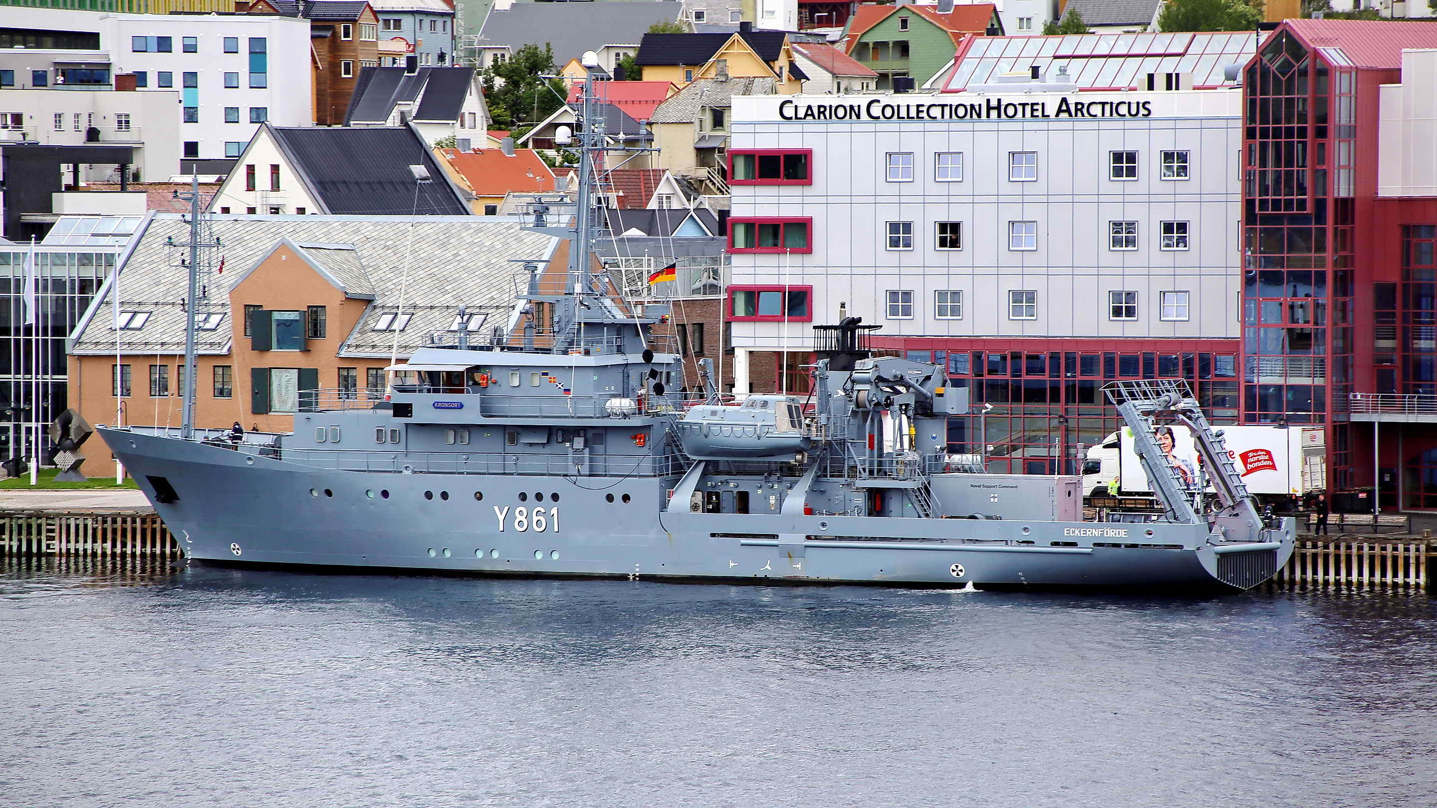 Mehrzweckerprobungsboot Kronsort in Harstad, Norwegen, im Juni 2018